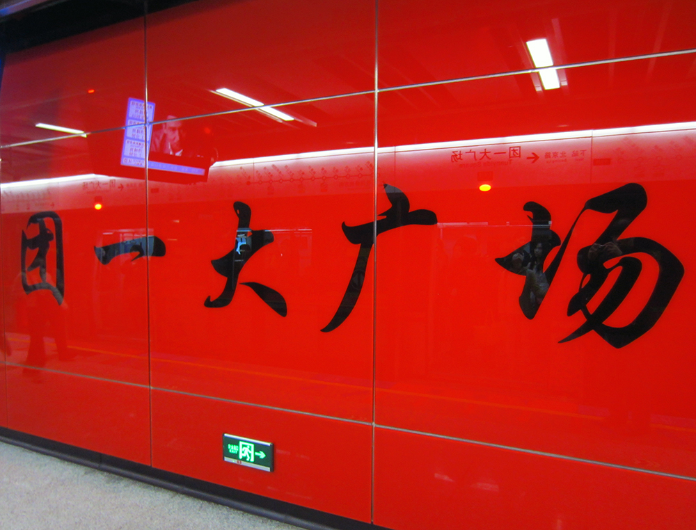 團一大廣場站台大字